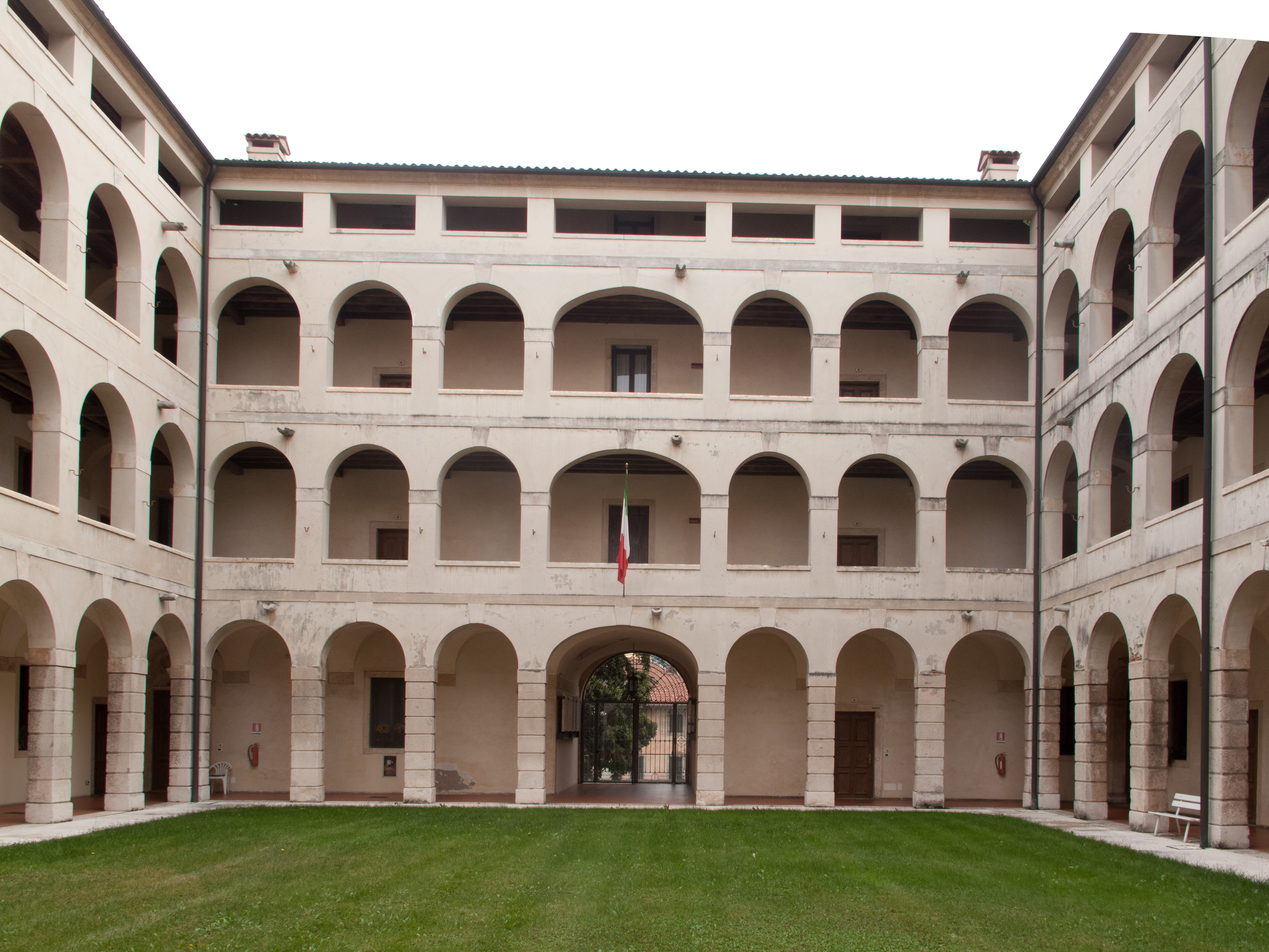 Vicenza - Istituto Proti - Cortile interno